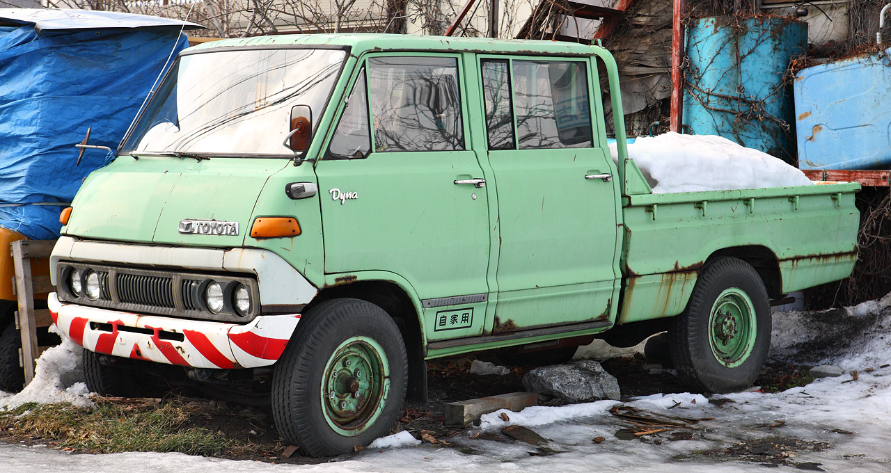 Toyota Dyna 2000 double cab( RU10P )